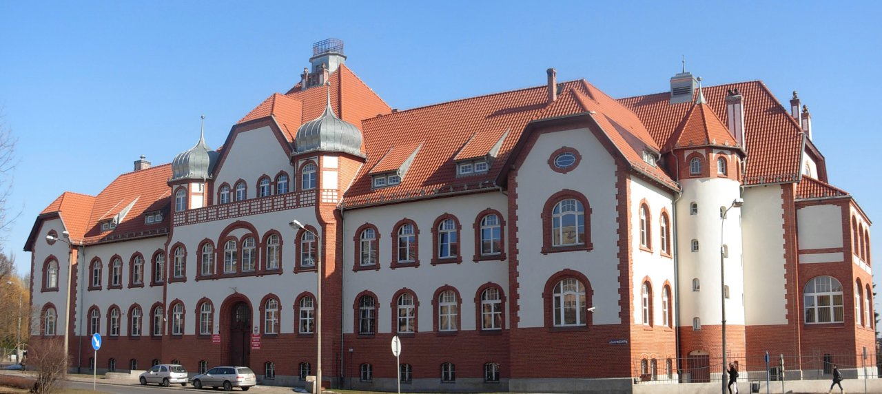 Instytuty Rolnicze w Bydgoszczy